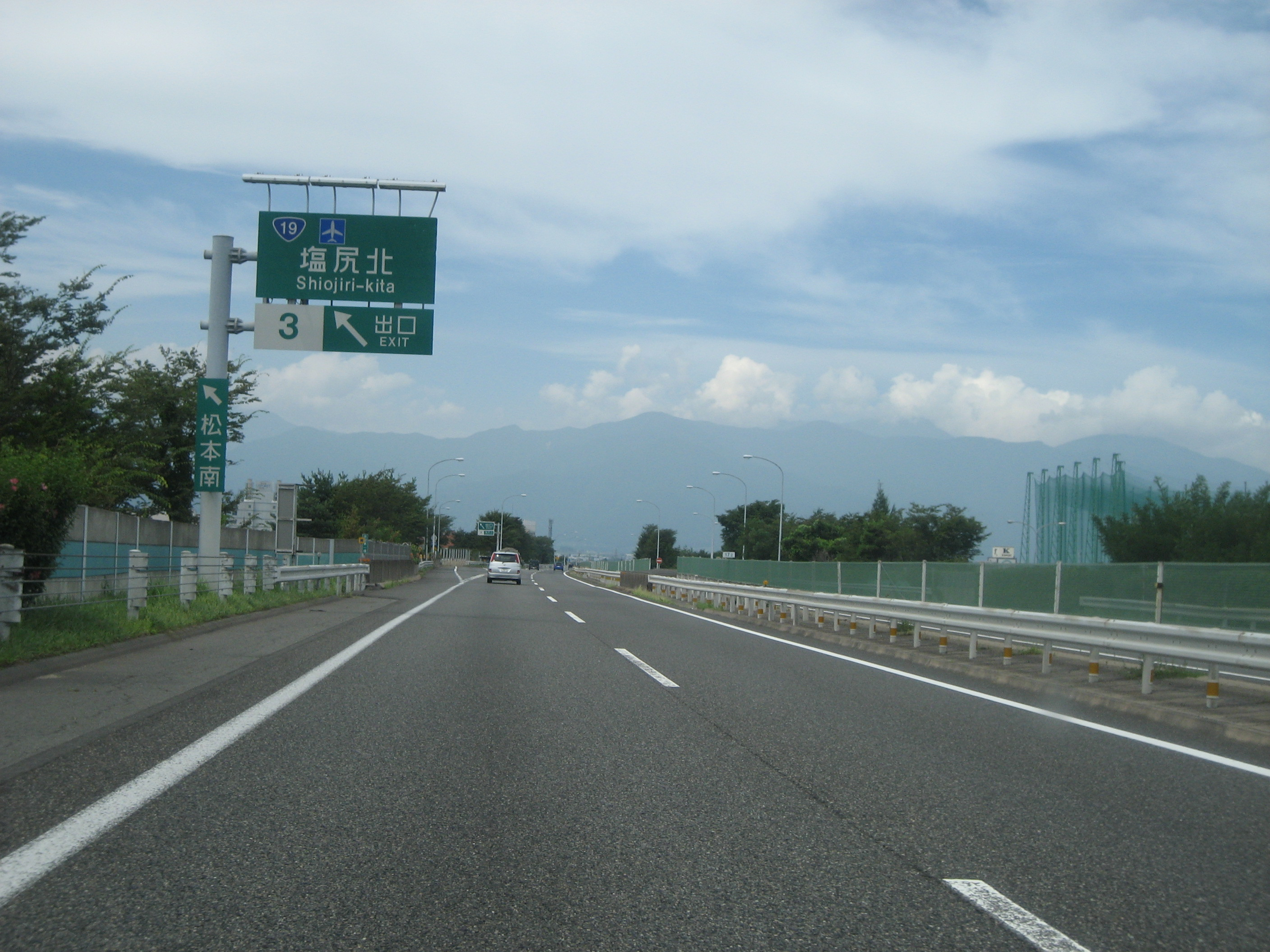 長野自動車道塩尻北インター出口付近